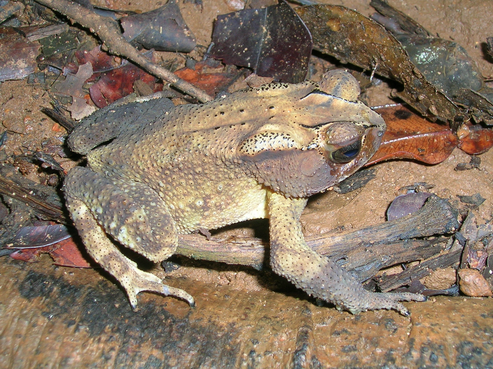 Bufo parietalis, Wayanad North, Kerala, India